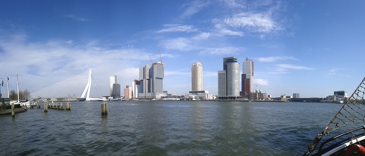 Panorama van Kop van Zuid genomen vanaf Veerhaven in april 2013